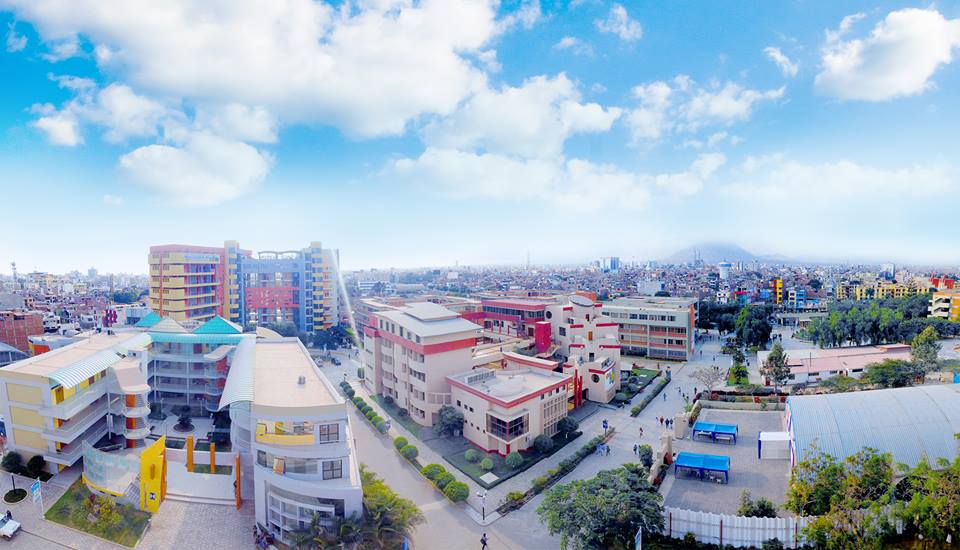 campus universitario